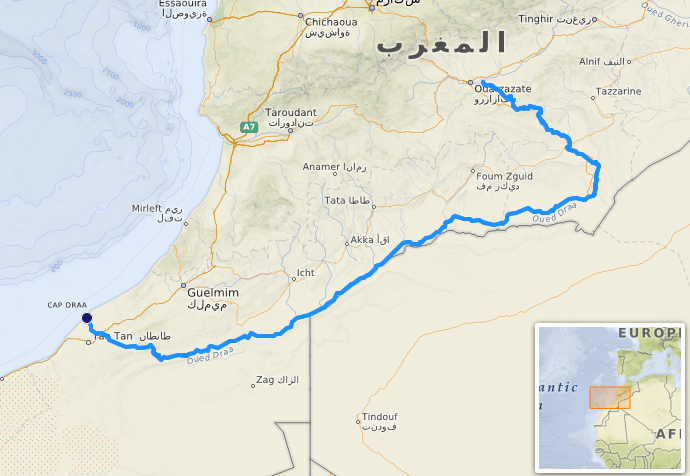 carte réalisée sur umap [1] This map may be incomplete, and may contain errors. Don't rely solely on it for navigation.